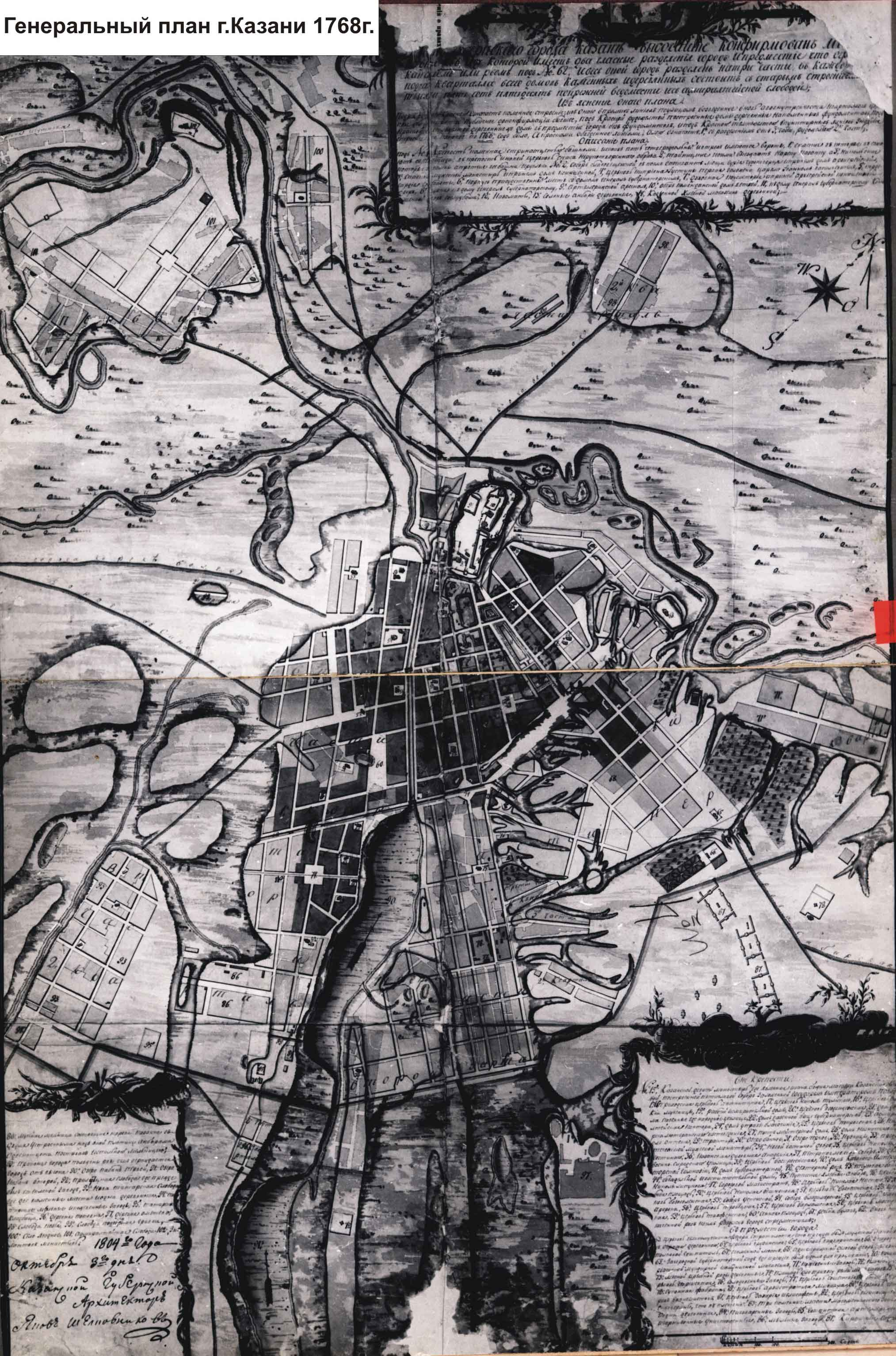 Генеральный план города Казани. Составлен В. И. Кафтыревым. «Высочайшее конфирмован» 17 марта 1768 года.